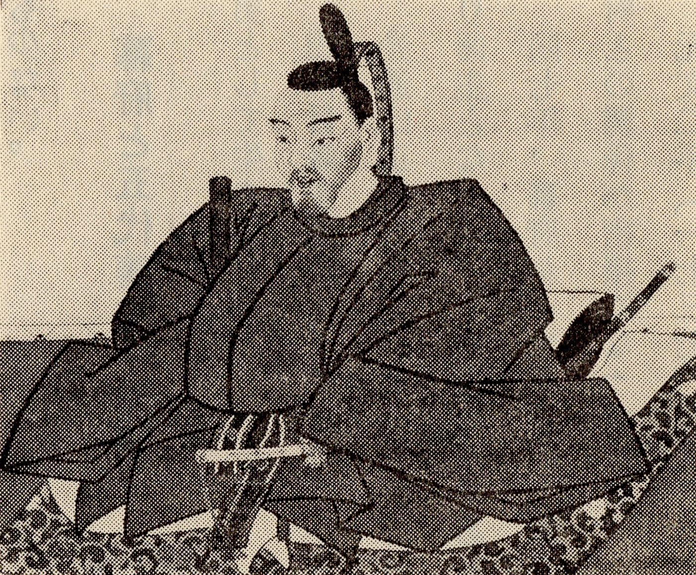 久留島光通の肖像(モノクロ)。